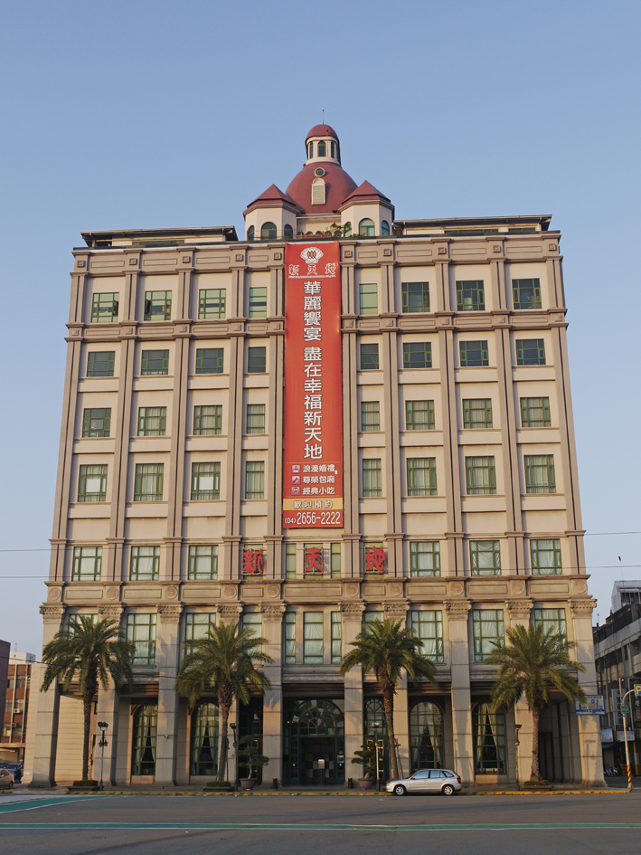 中文（台灣）: 梧棲新天地